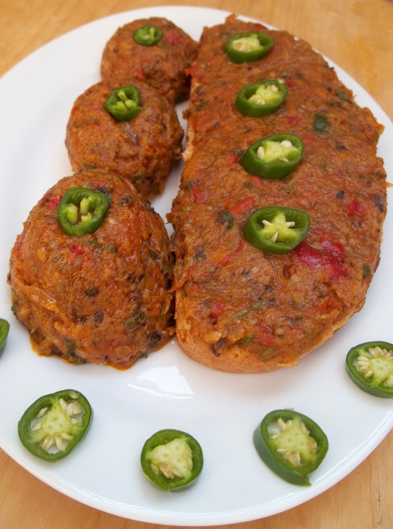 Баклажанная икра